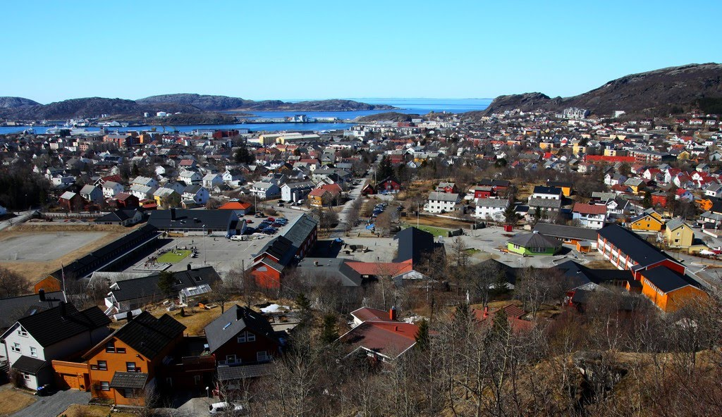 Saltvern skole i Bodø